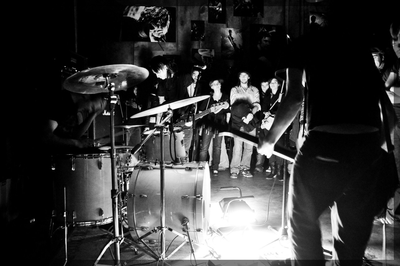 birds in row